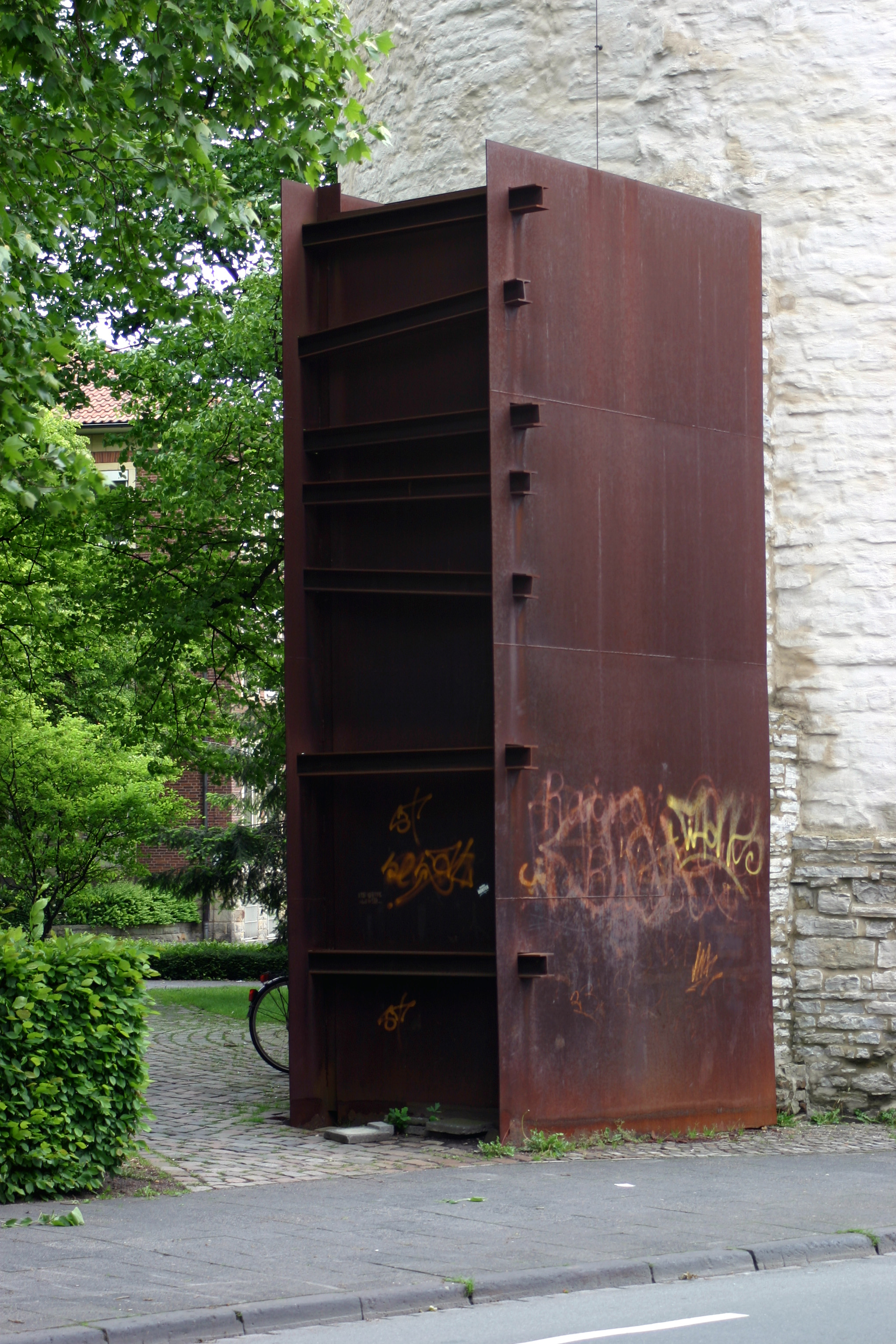 Susana Solano - Intervenciòn en Münster (Eingriff in Münster) - Standort: Münster, am Buddenturm, Münzstraße/Buddenstraße